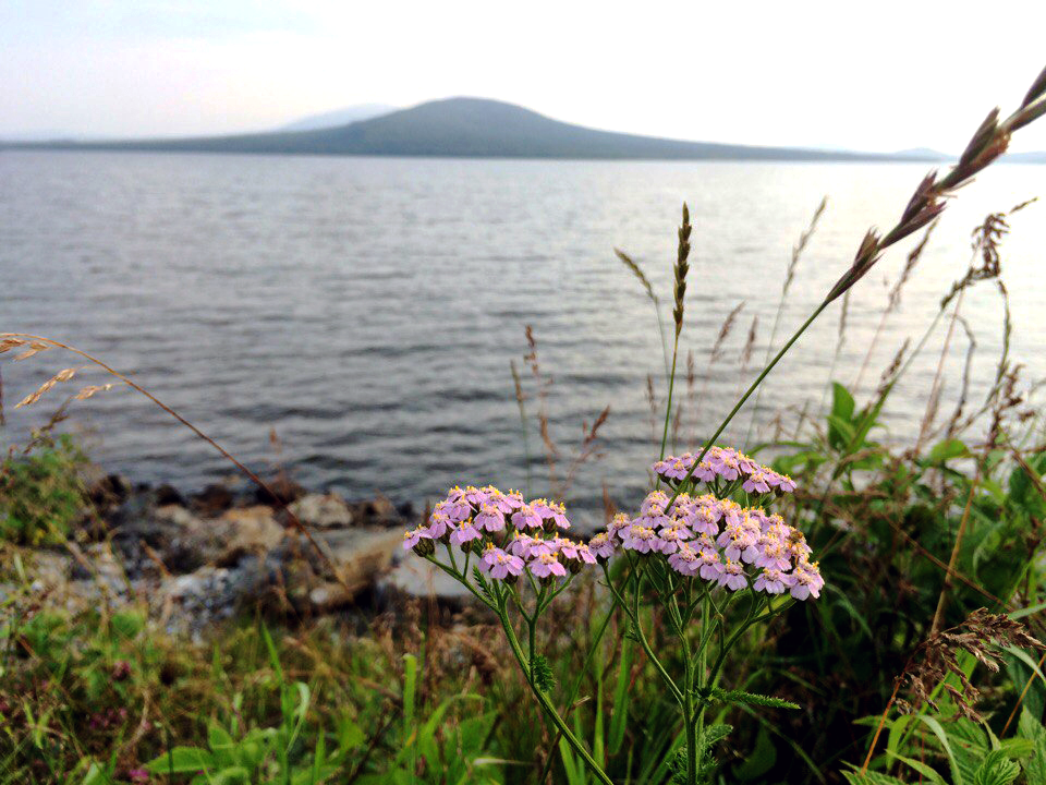 Каменный мыс, Саткинский район, Челябинская область